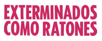 “EXTERMINADOS COMO RATONES”. Los días 17 y 19 de julio aparecen en los desconocidos diarios “Lea” de Argentina y “O Día” de Brasil dos listas de 119 miristas chilenos señalando que se estaban matando entre ellos en el exterior. El 24 de ese mes el diario “La Segunda” recoge la información y titula en portada “Exterminados como ratas”. Posteriormente se prueba que la acción conocida como “Operación Colombo” fue digitada por la DINA. Todos fueron sido asesinados en Chile y hechos desAparecer.